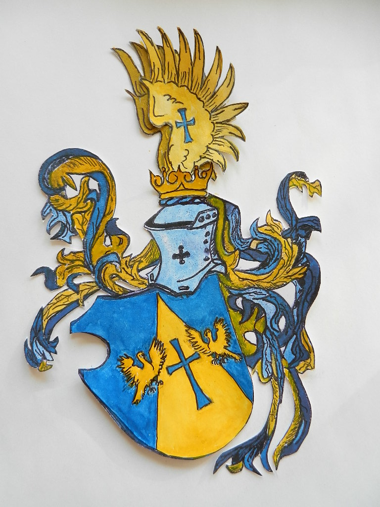 Das Wappen der Gernerth (Wien 1888) wurde nach der Wappenbeschreibung nach heraldischen Regeln gezeichnet. Der Grafiker Jürgen Gerner hat Gerner, Gernet, Gernert(h), Görner Wappen nach Quellen gezeichnet.